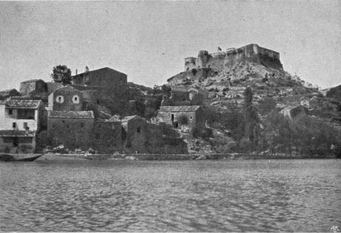 Original description: "Zabliak, Montenegro"